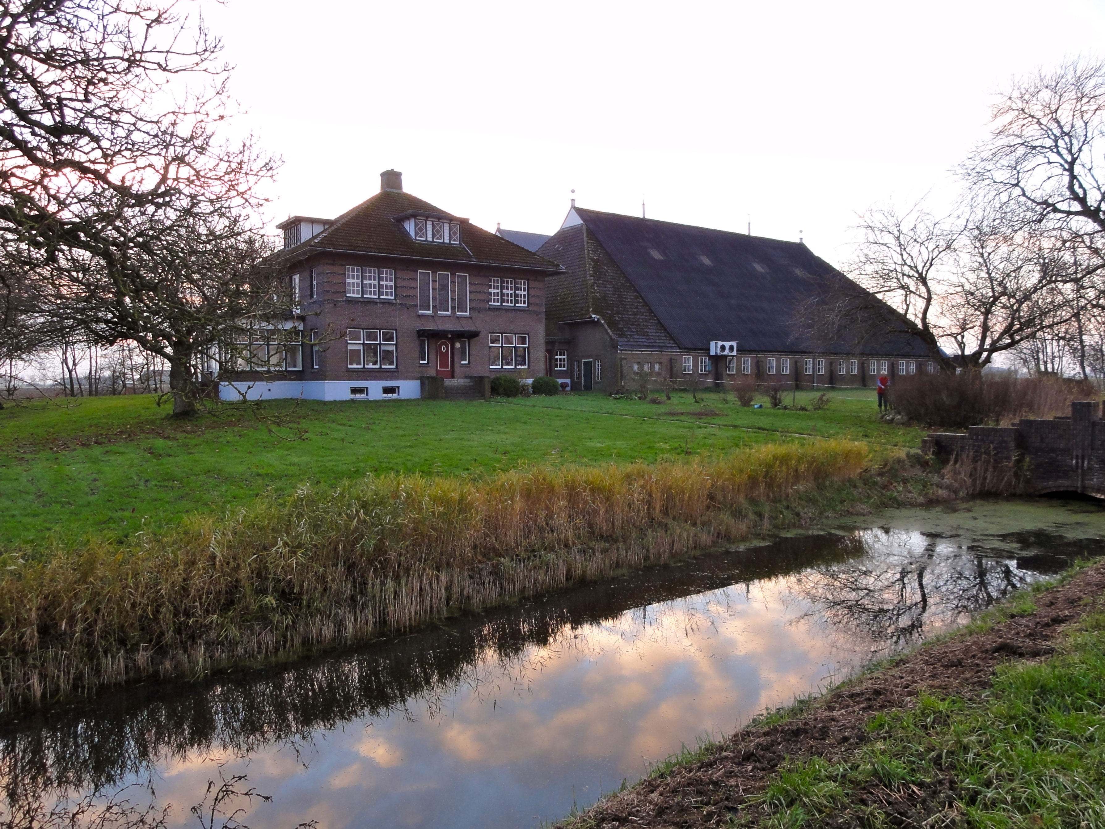 Boerderij Kooyenburg Vlakkeriet 4 in Zuurdijk